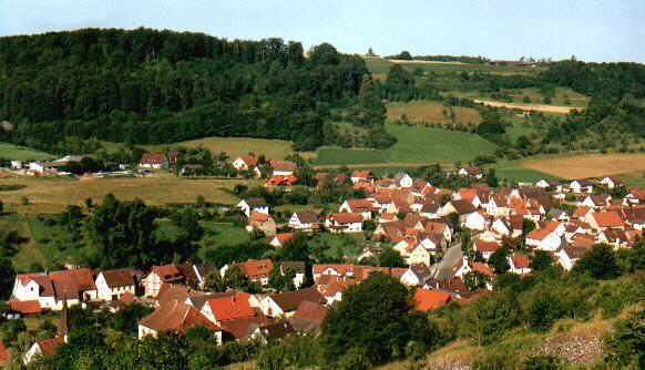 Panorama über Archshofen von Süden her